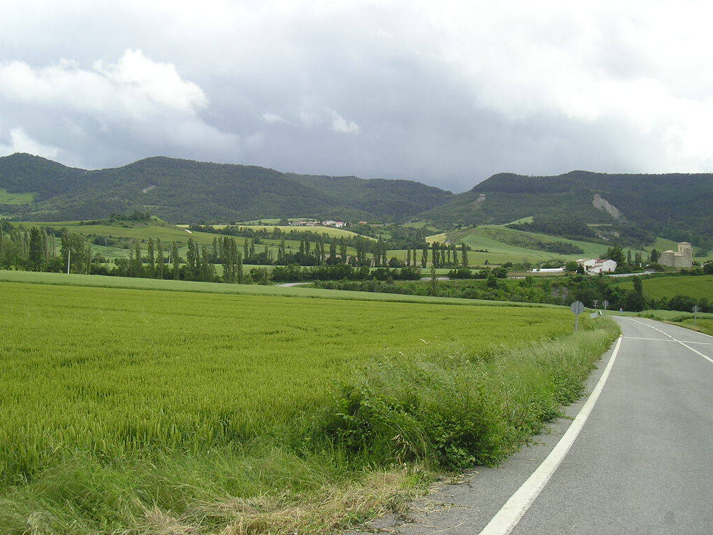 Nafarroako Eguesibar udalerriaren inguruko mendiak.